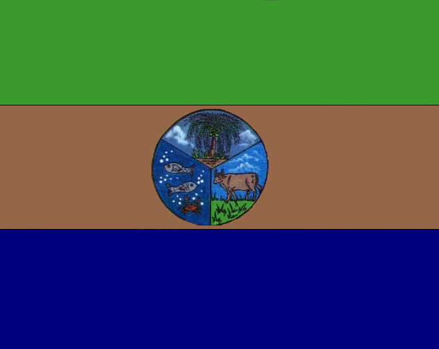 Bandera del municipio Acosta del estado Falcón.